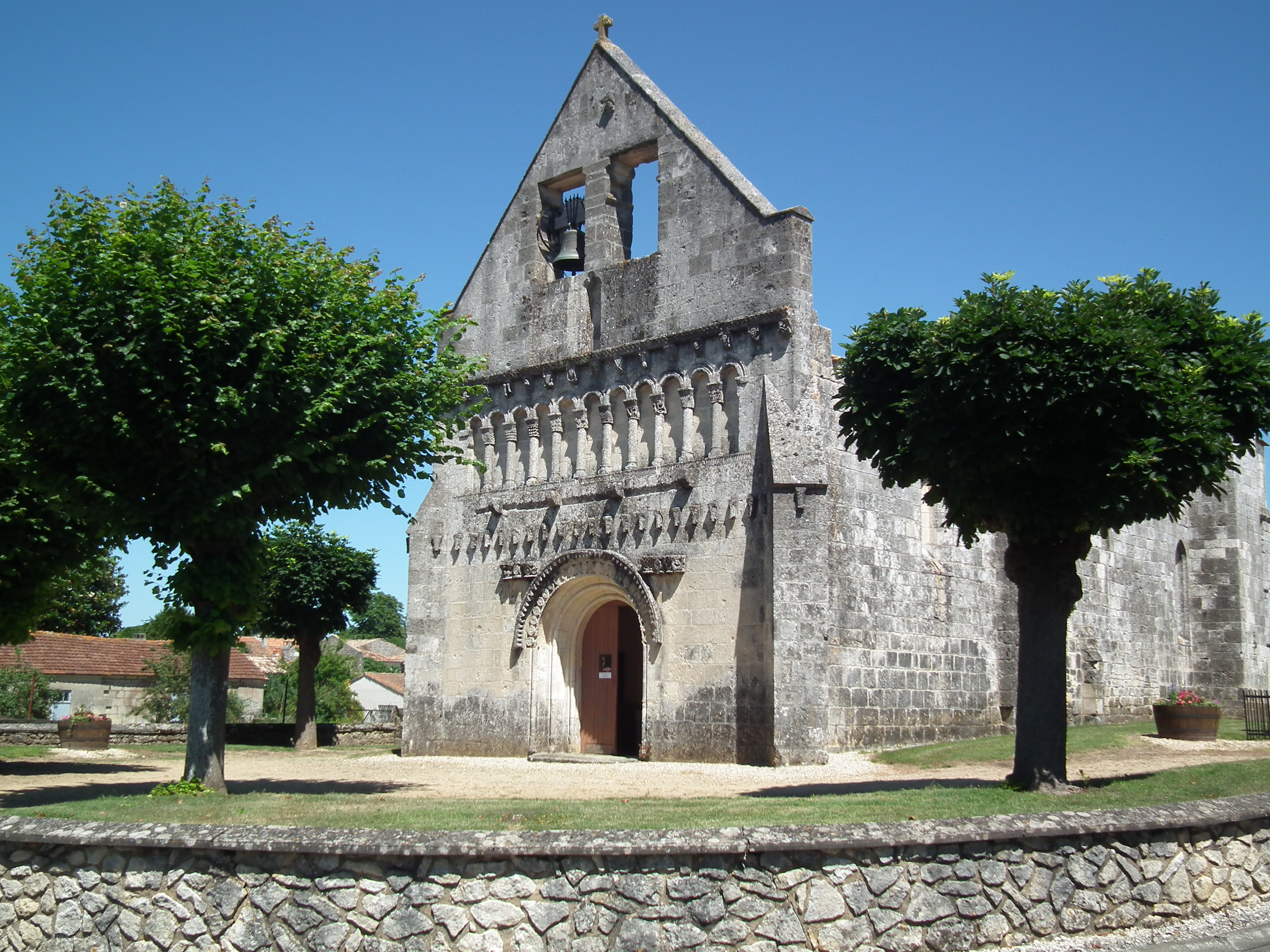 L'église romane de Saint-Quantin-de-Rançanne